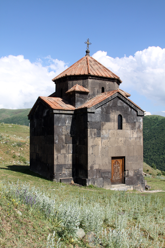 51/7 Մատուռ Թուխ Մանուկ, Լուսագյուղ, Արագածոտնի մարզ